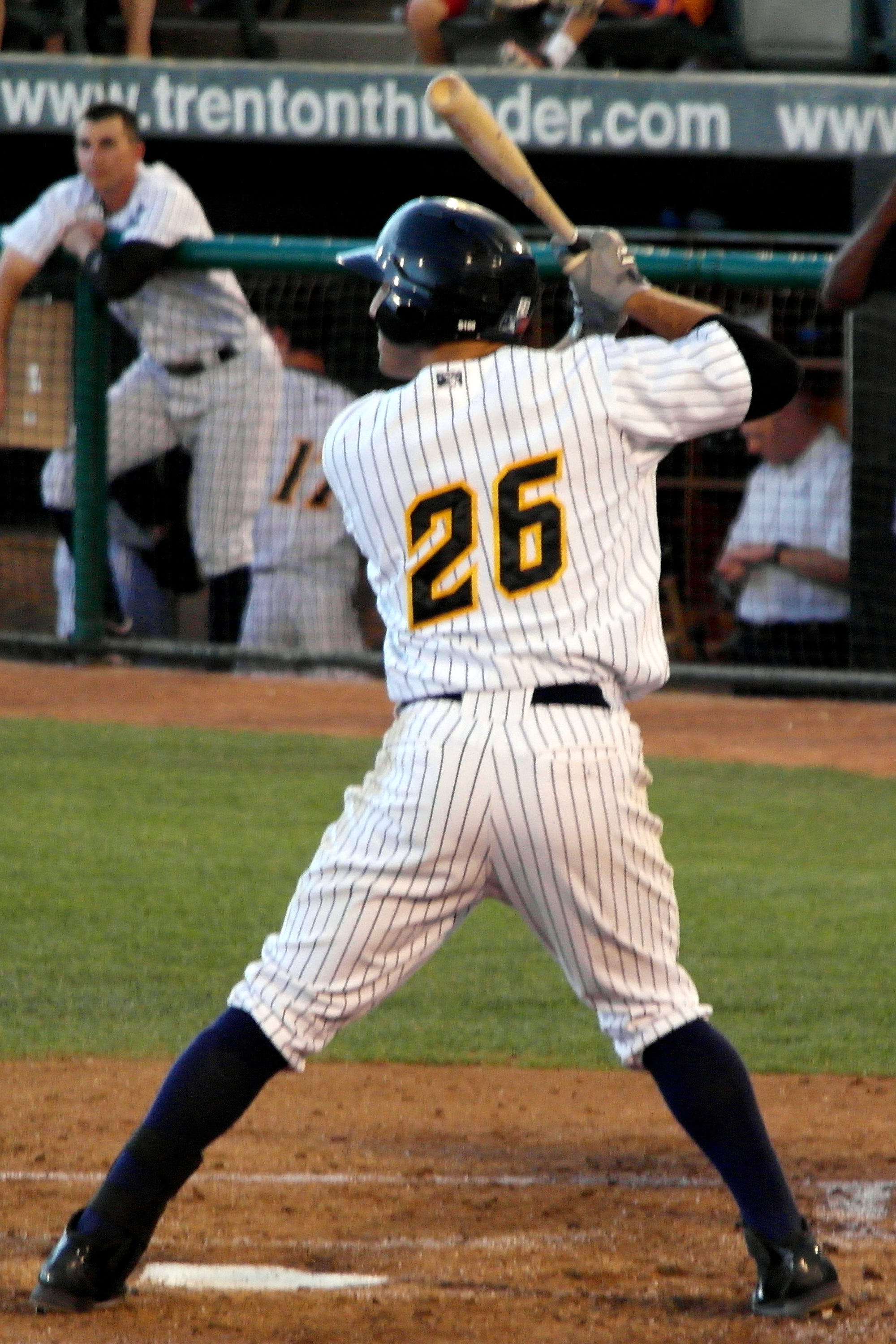 Rob Segedin